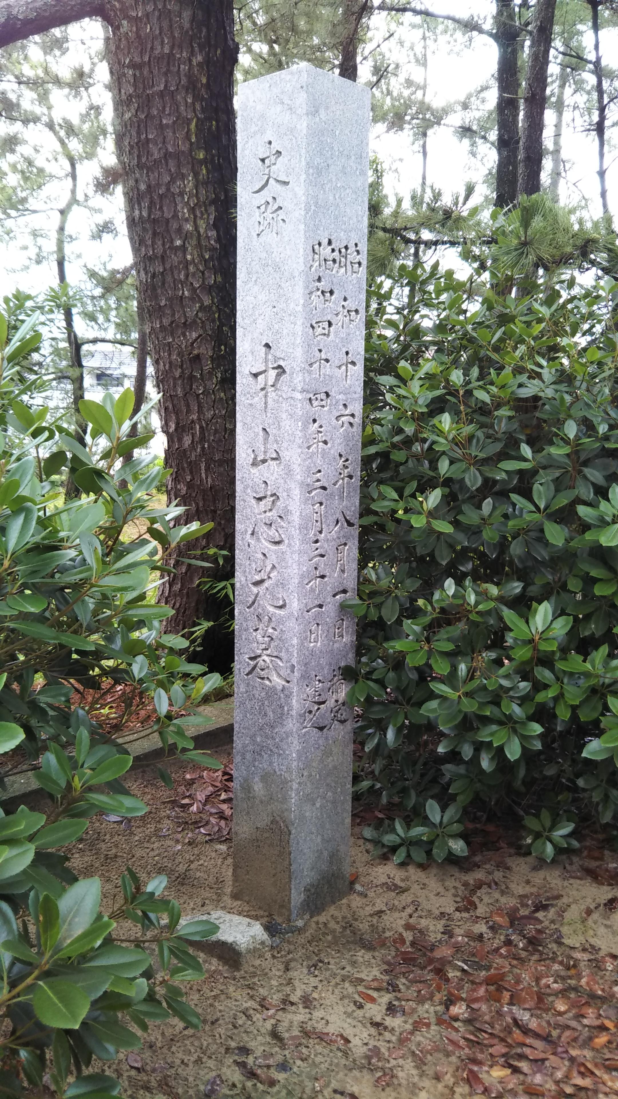 史跡指定から何年か後に建てられた史跡 中山忠光墓と書かれた石碑